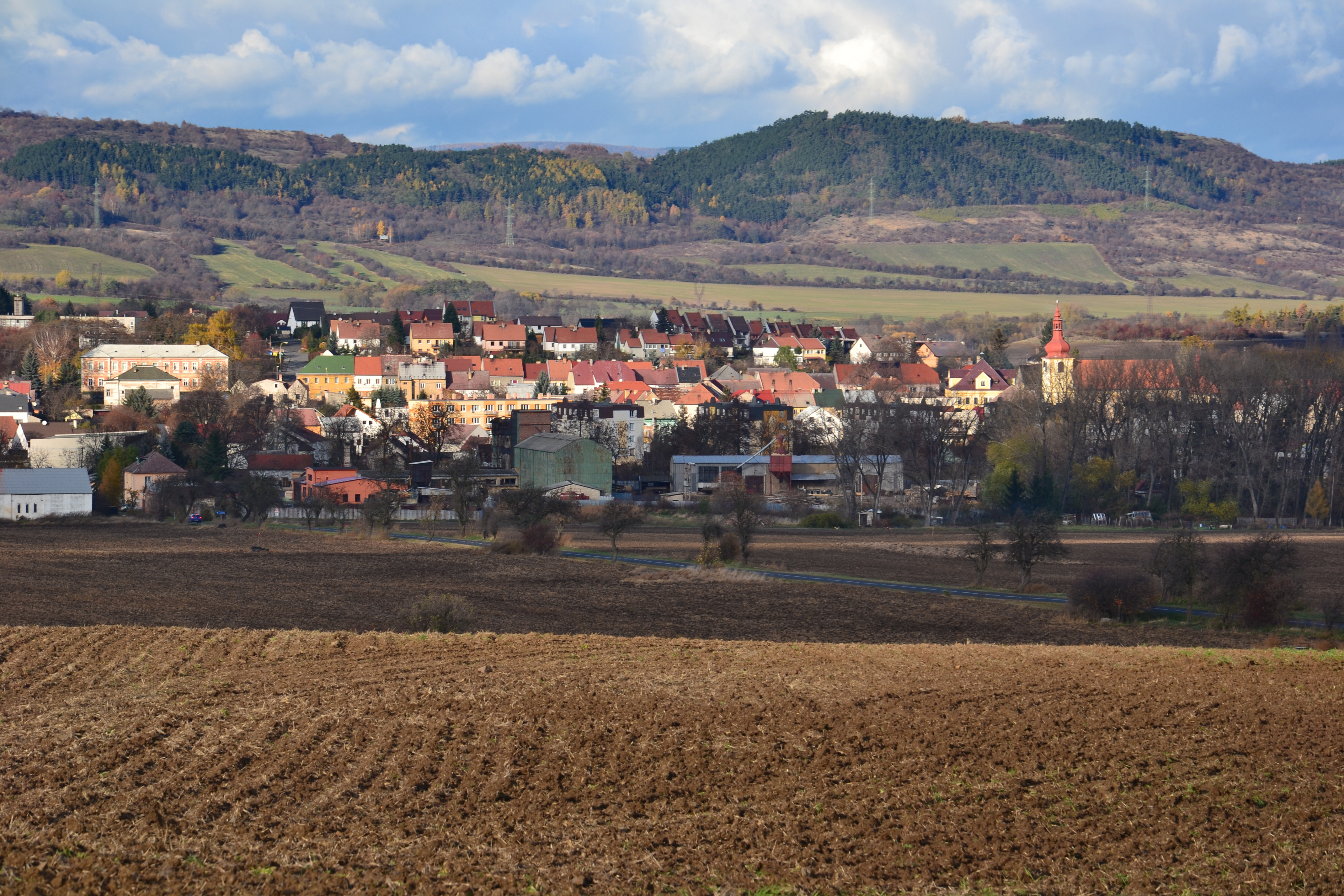 Celkový pohled z jihu